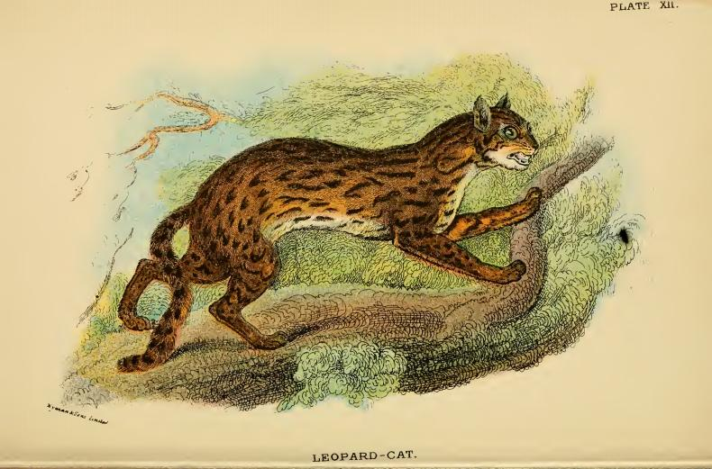 Leopard Cat